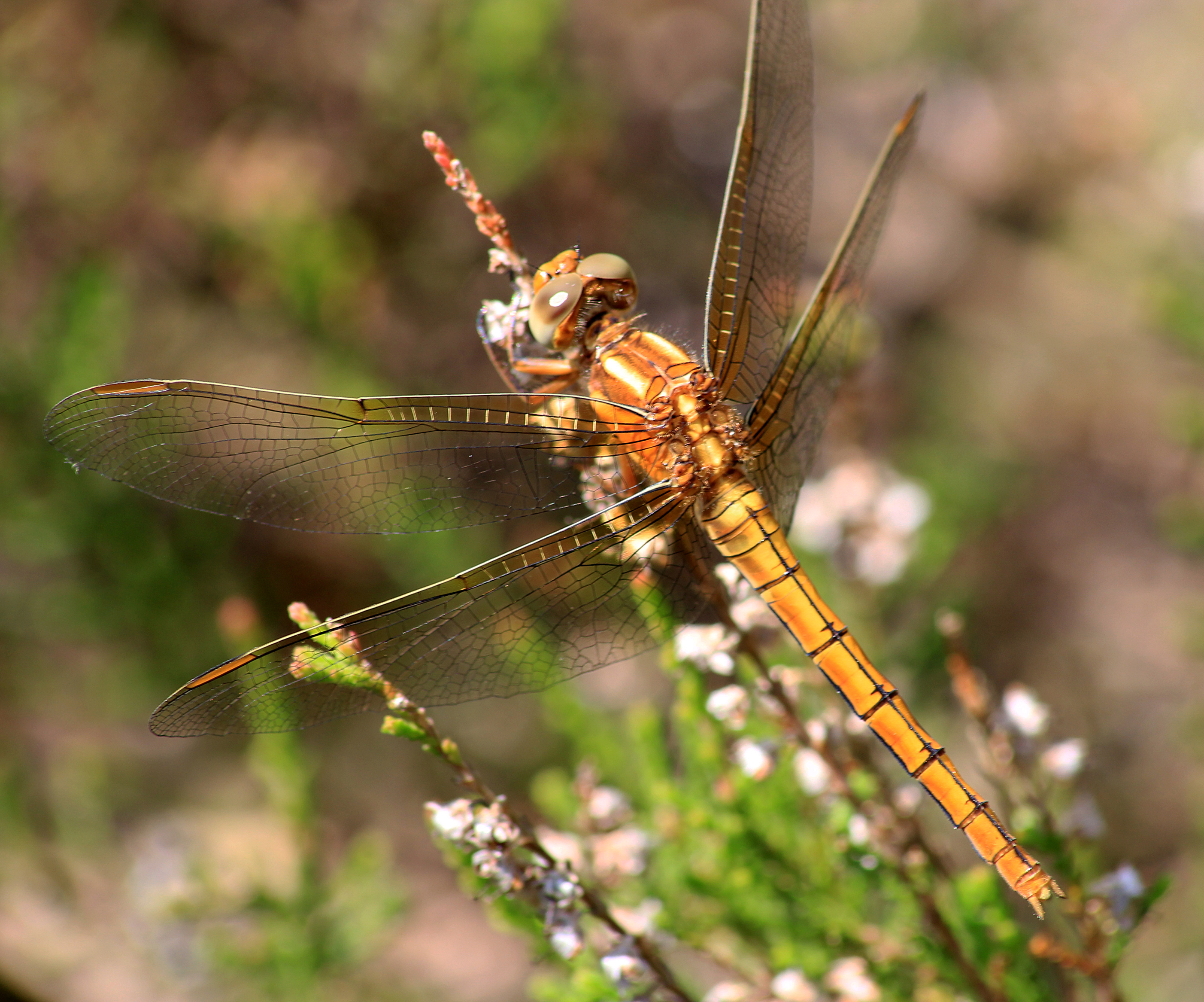 Germany: Niedersachsen, Kreis Gifhorn, 10 June 2013. Orthetrum coerulescens, female, very young animal. Photo: Christina Appel.